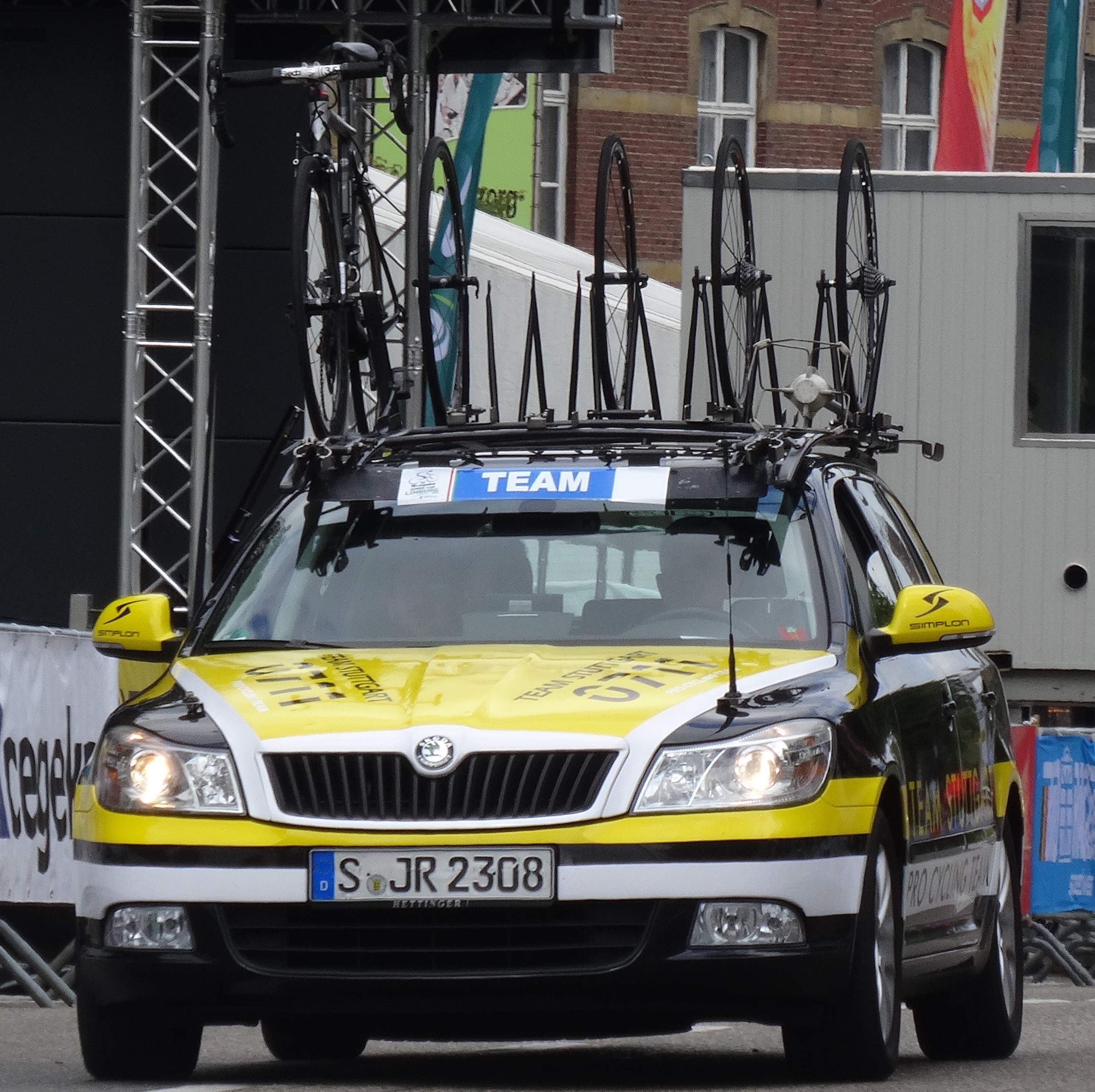 Reportage photographique réalisé le dimanche 15 juin à l'occasion du départ et de l'arrivée du Tour du Limbourg 2014 à Tongres, Belgique.